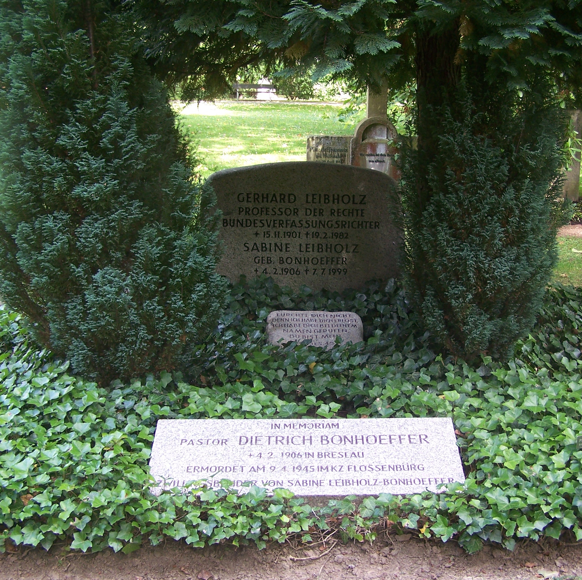 Stadtfriedhof zu Göttingen: Gedenkstein für Dietrich Bonhoeffer am Grab seiner Zwillingsschwester Sabine Leibholz-Bonhoeffer und ihres Mannes Gerhard Leibholz